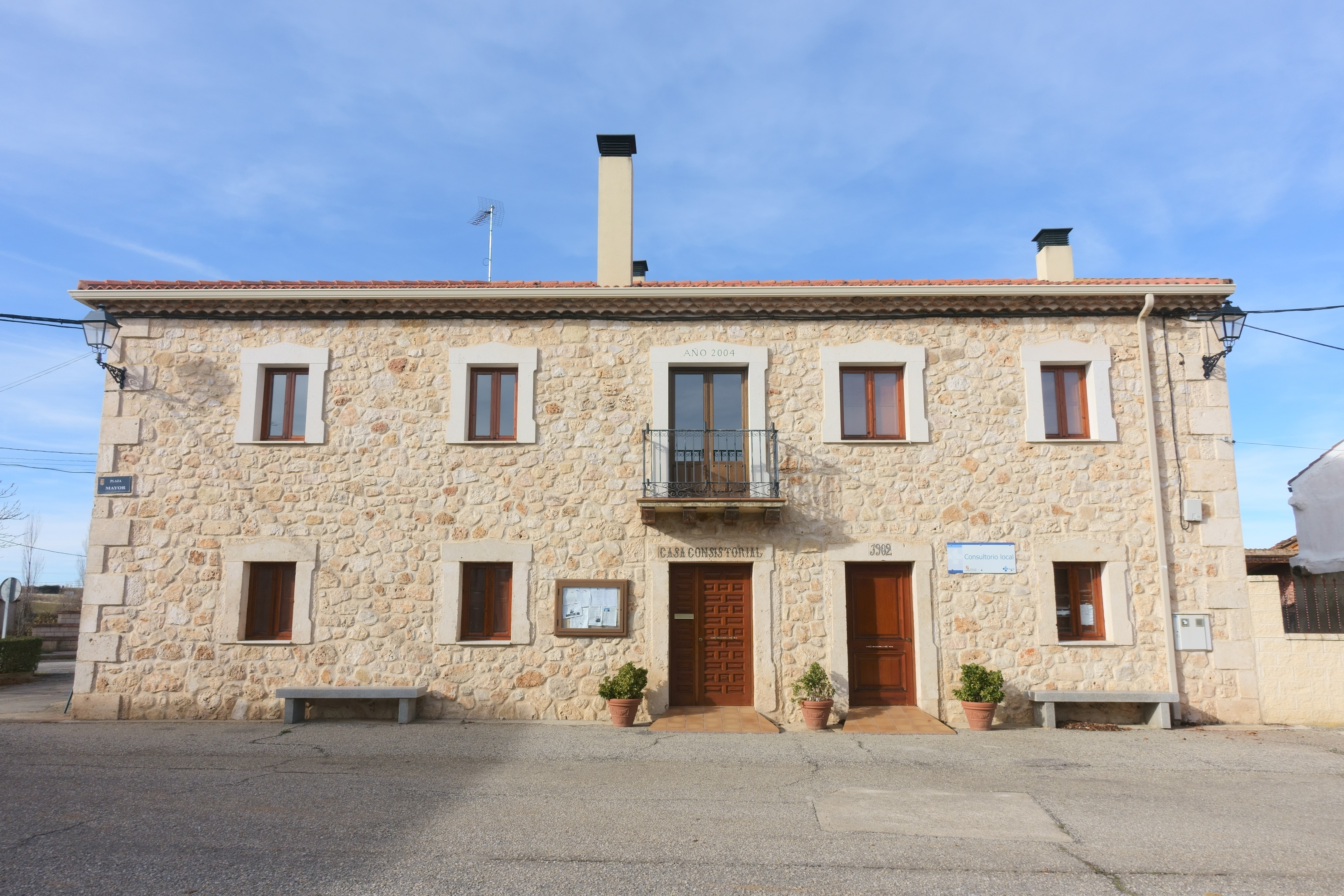 Casa consistorial de Bercimuel (Segovia, España).